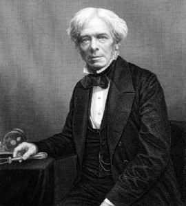 El hombre que invento los globos